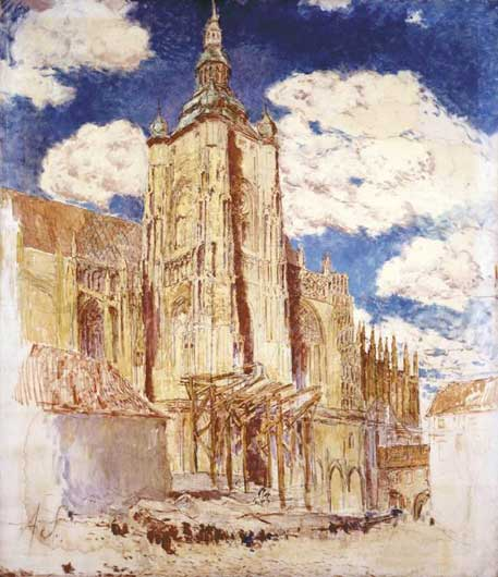 Dóm sv. Víta (1909), olej, plátno, 216 x 187 cm